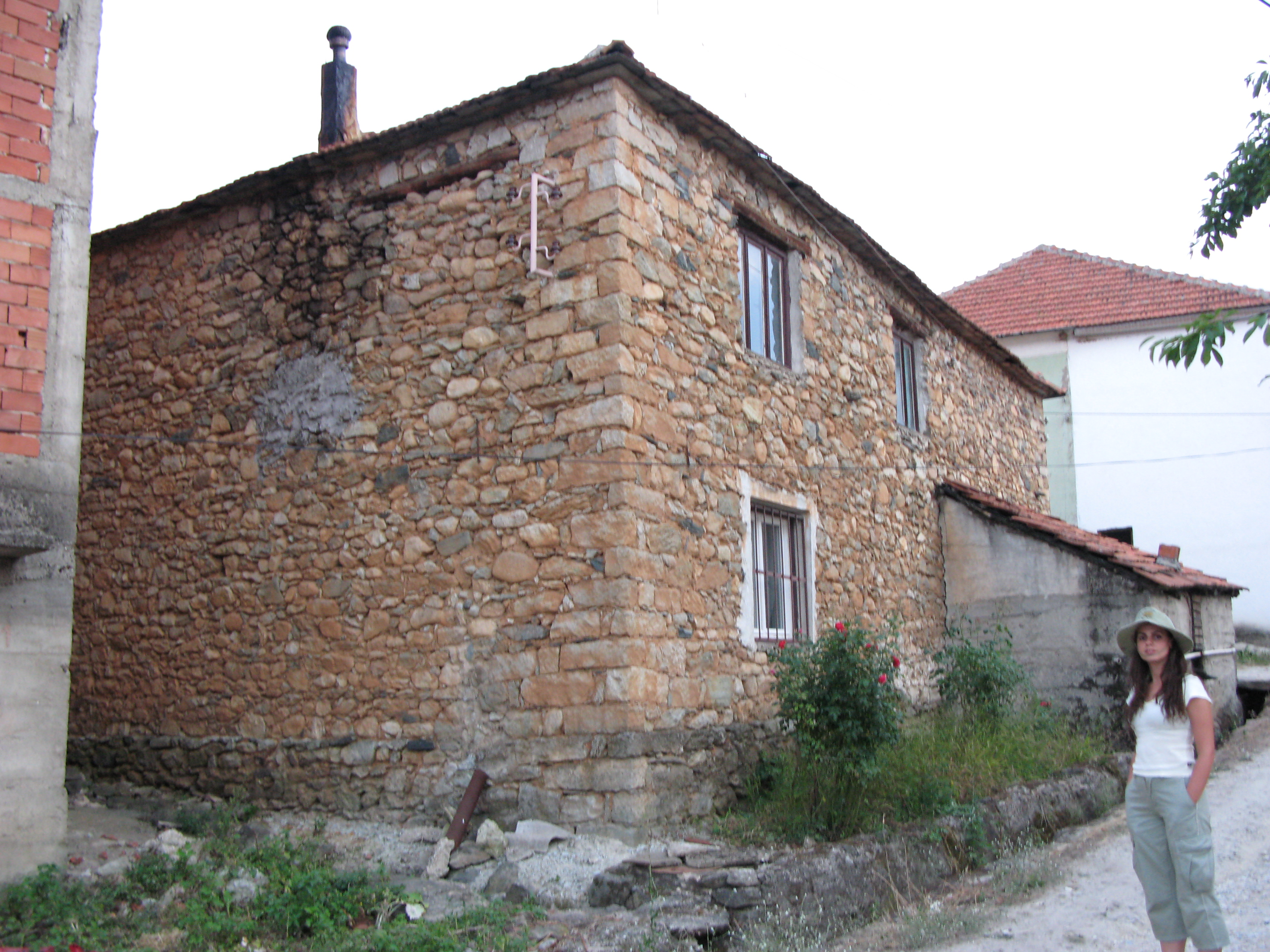 Село Ротино код Битоља, Македонија